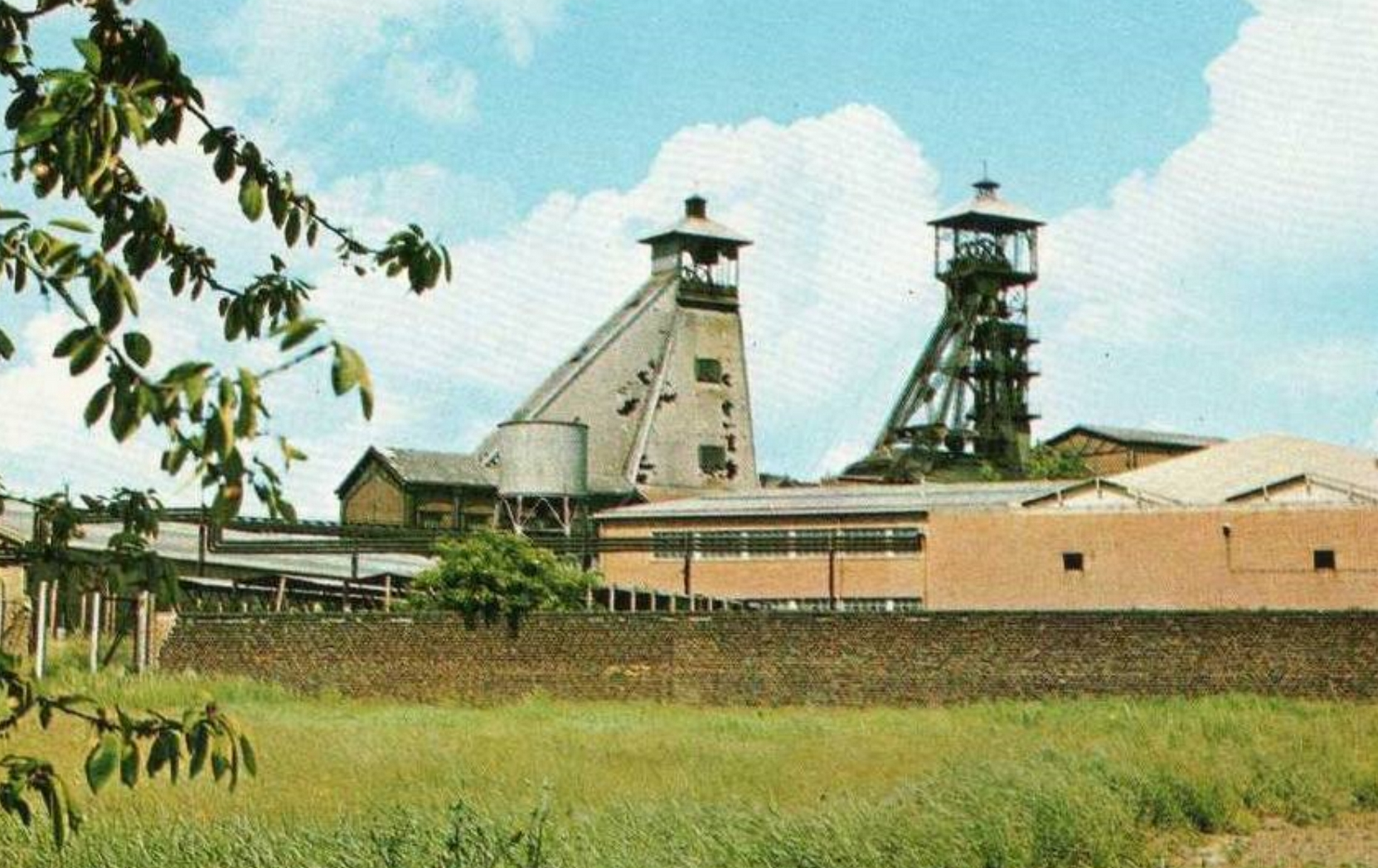 La Fosse n° 6 - 14 dite Alfred Dupont de la Compagnie des mines de Courrières était un charbonnage constitué de deux puits situé à Fouquières-lez-Lens, Pas-de-Calais, Nord-Pas-de-Calais, France.